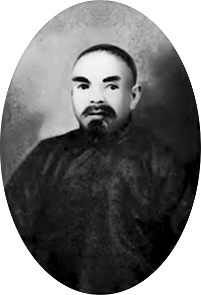 八極拳名家李書文畫像（2010年修復）